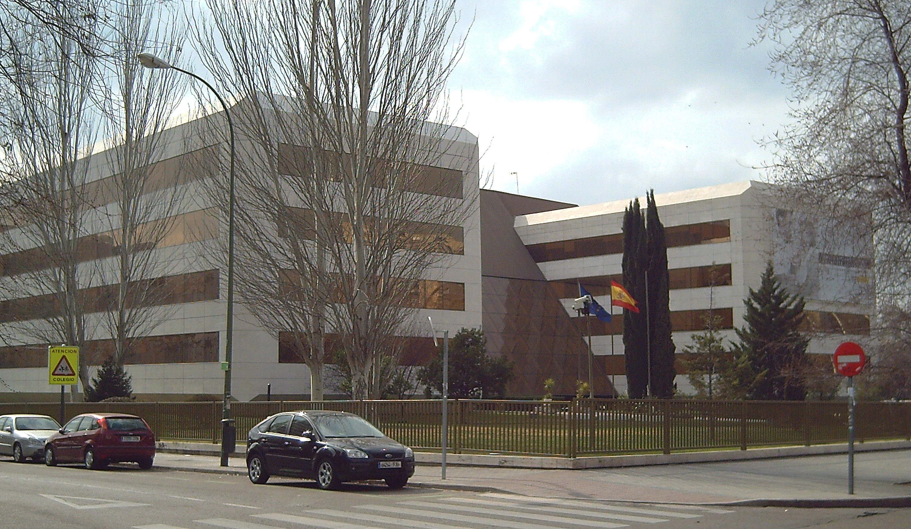 Sede principal del Instituto de Mayores y Servicios sociales (IMSERSO), del Ministerio de Sanidad, en la Avenida de la Ilustración, en Madrid.